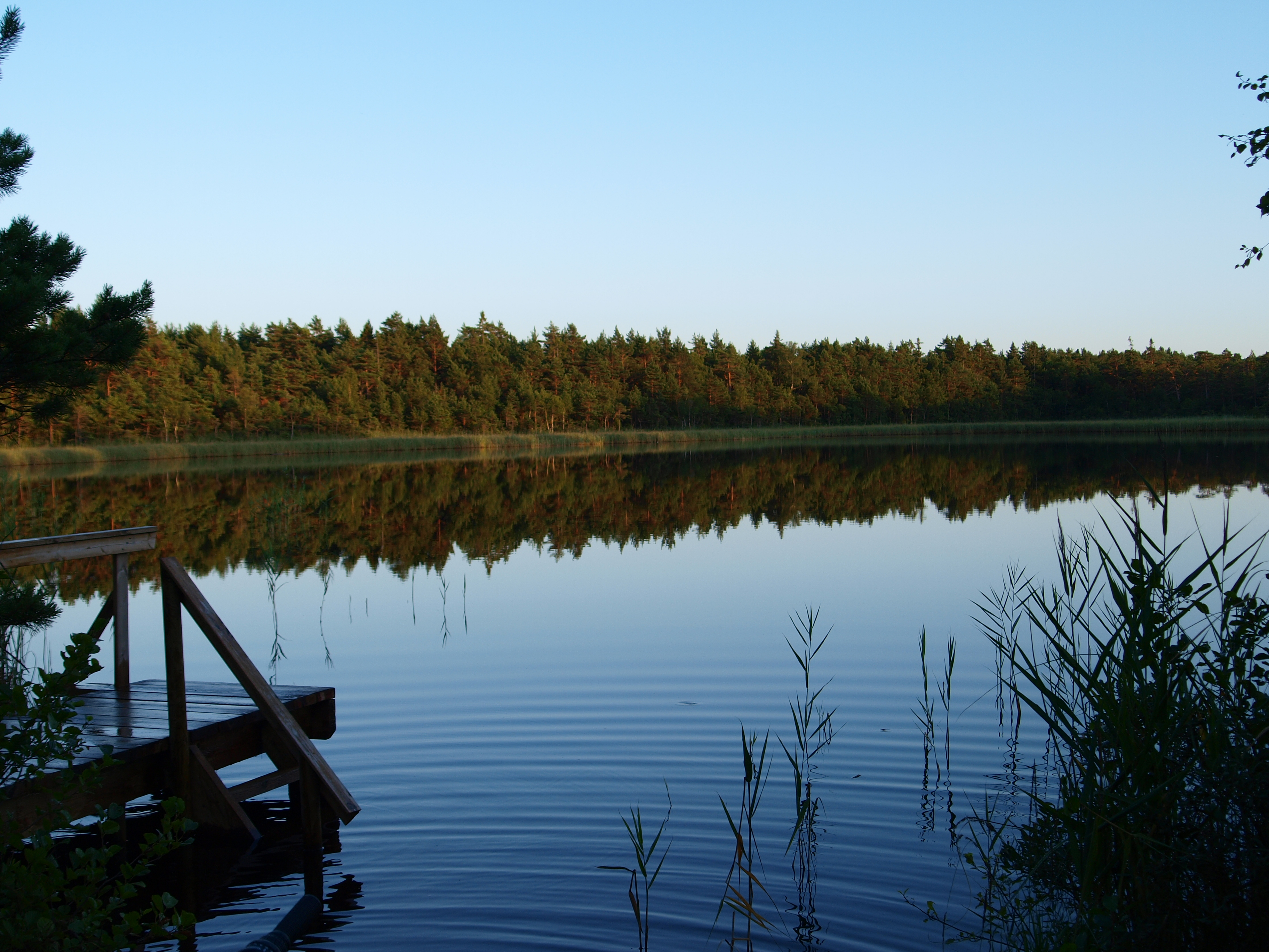 Toatse järv